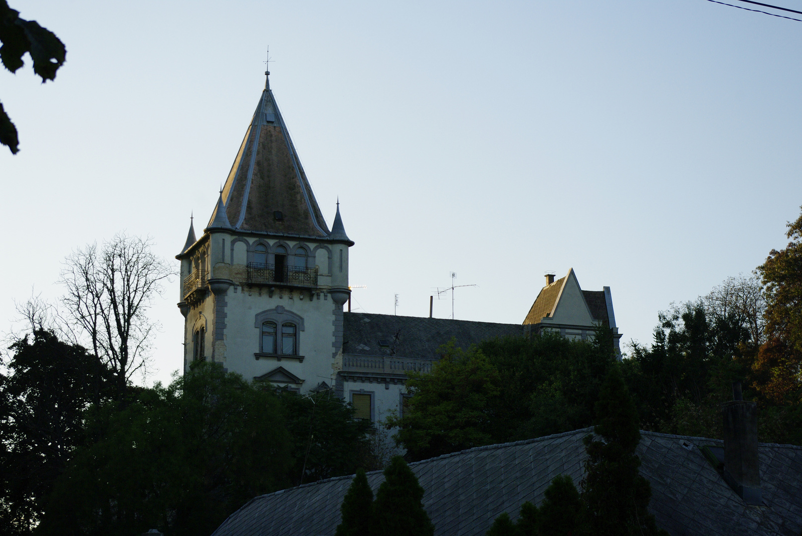 Czuba-Durozier-kastély (Budapest 22, Plébánia utca 11., Plébánia utca 11-13.)